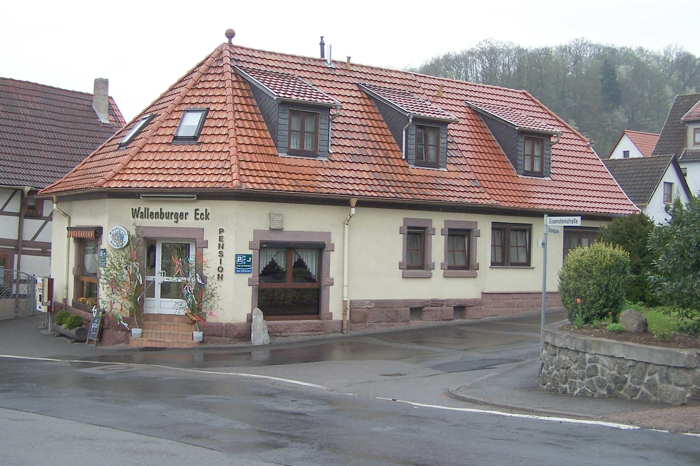 Die Pension "Wallenburger Eck" markiert den Beginn des Ortsteils Auwallenburg.